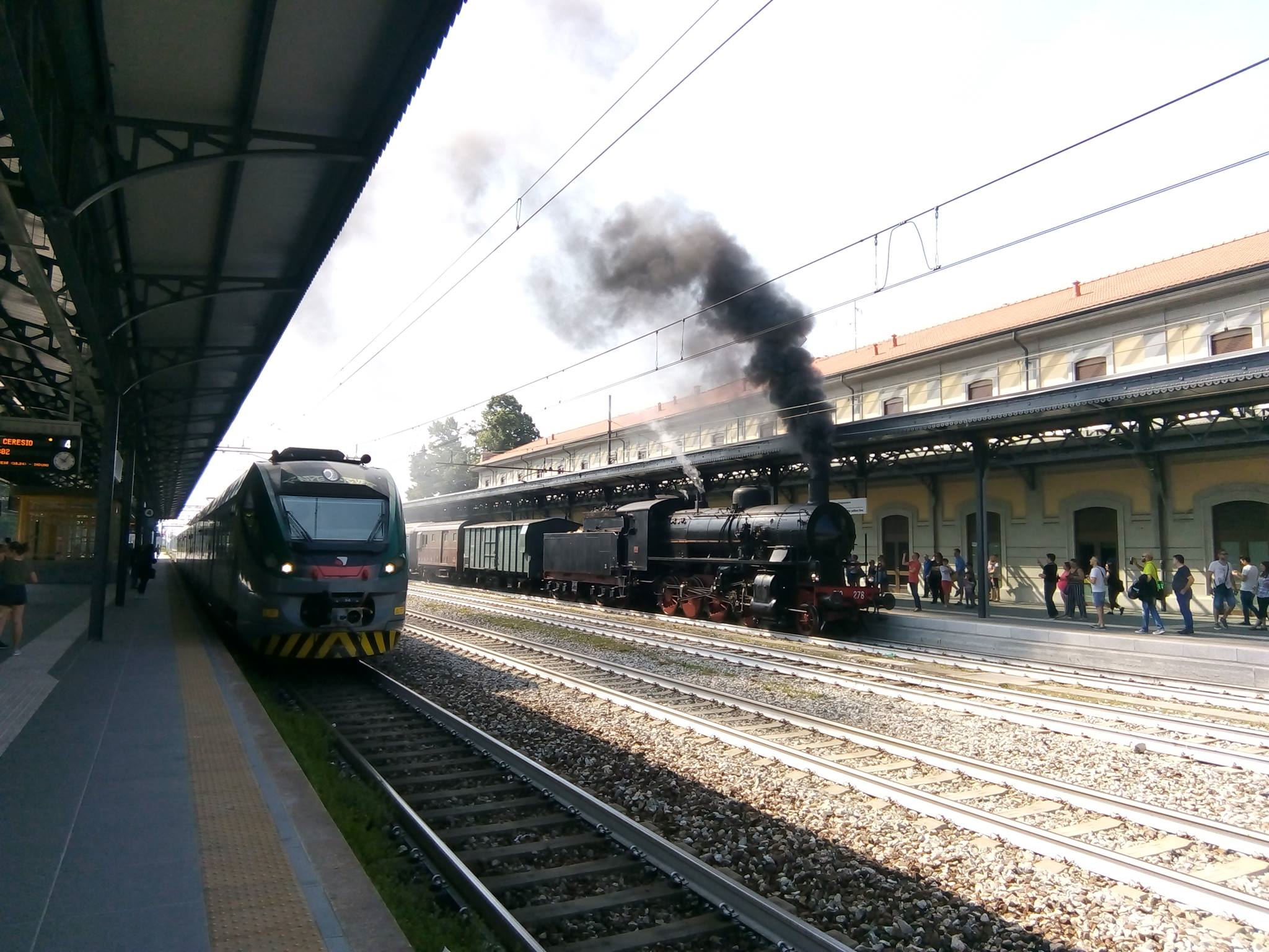 Treno storico a Busto Arsizio, giugno 2018